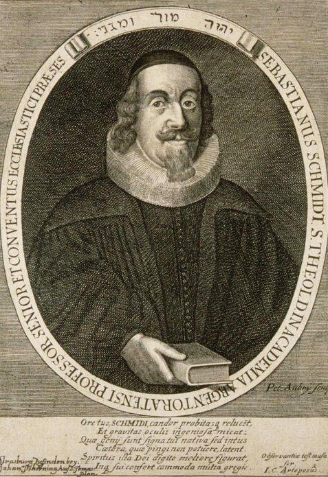 Sebastianus Schmidt S. Theol. D. in Academia Argentoratensi Professor Senior et Conventus ecclaesiastici Praeces (1617-1696). 1690. Bibliothèque nationale et universitaire de Strasbourg